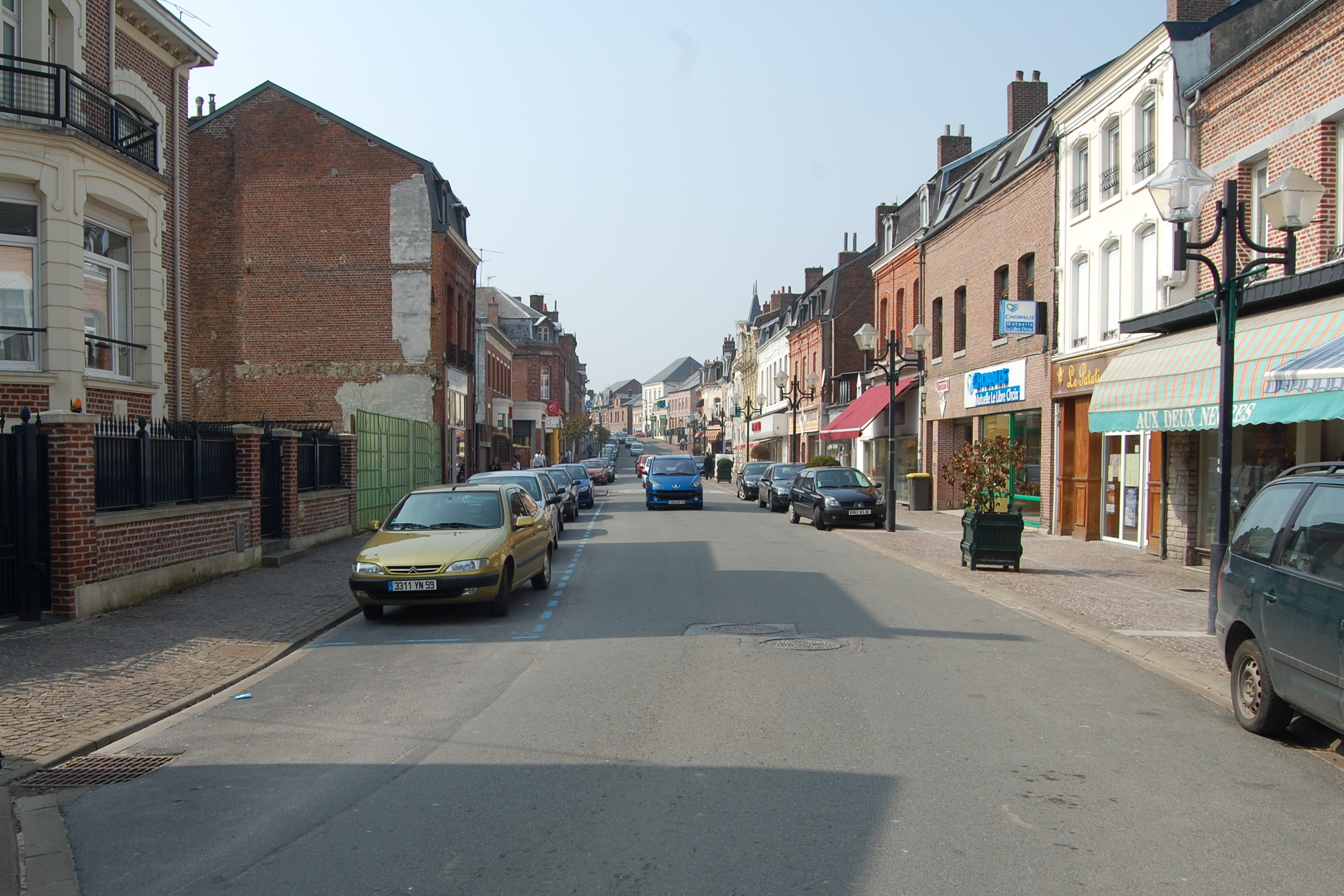 Straßenbild aus der französischen Gemeinde Fourmies unweit der belgischen Grenze im Département Nord.